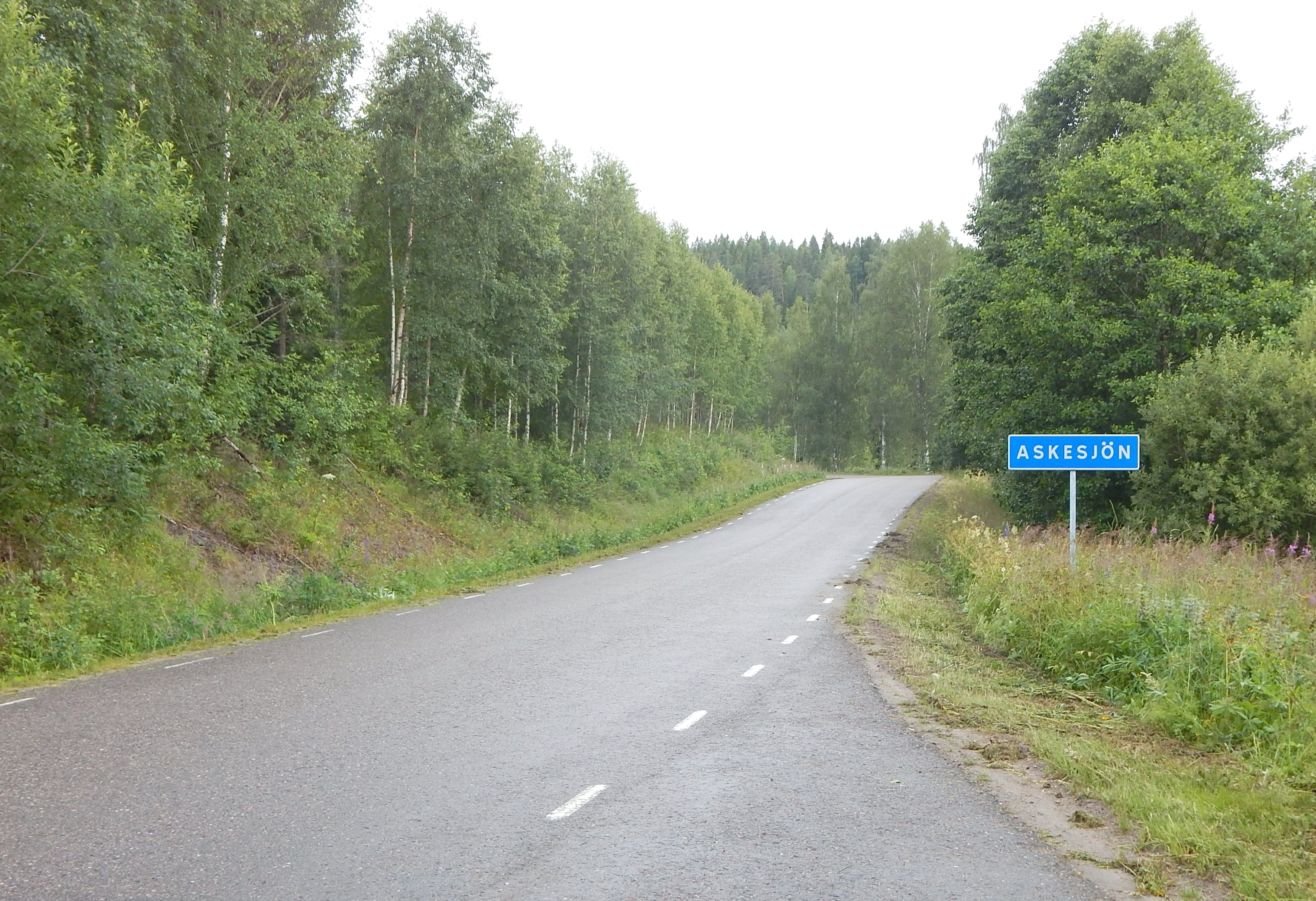 Sekundär länsväg S628 vid Askesjön